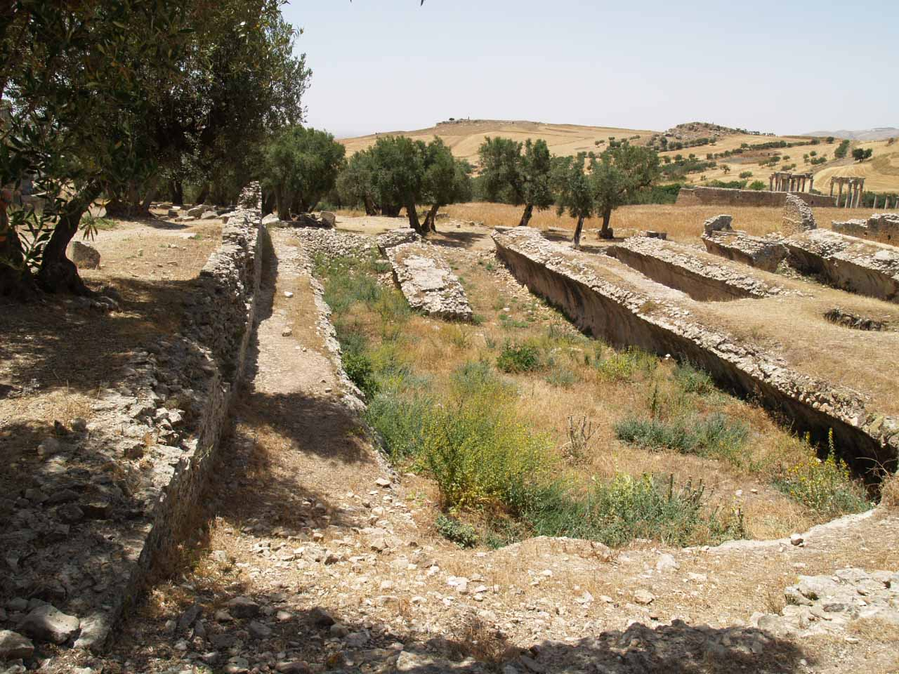 Dougga, citernes d'Aïn El Hammam